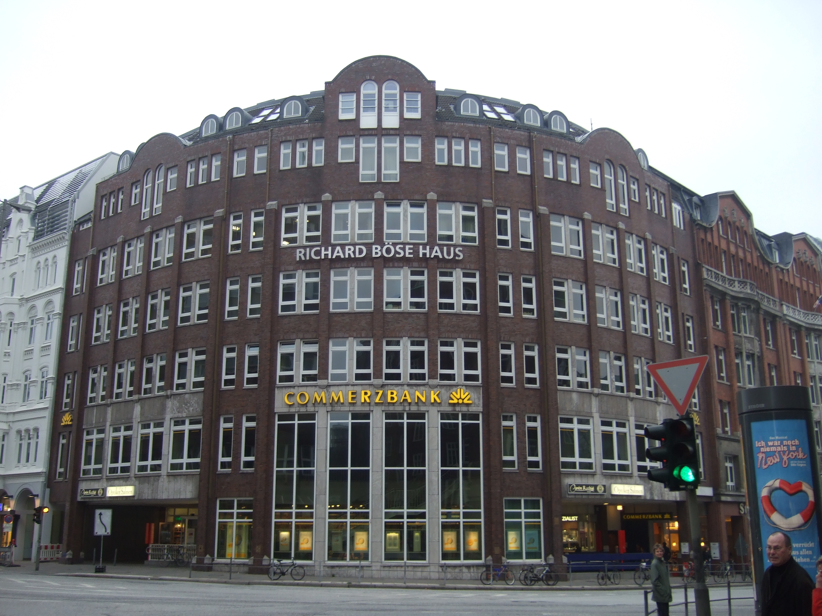 Richard-Böse-Haus in Hamburg, Gänsemarkt 43. Sitz von XING.